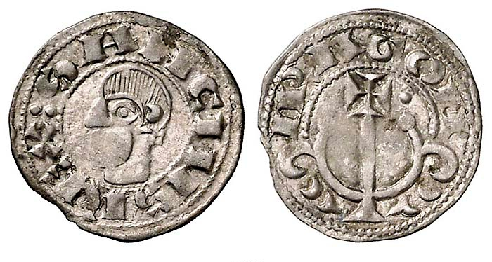 Óbolo de Sancho Ramírez de Aragón acuñado entre 1064 y 1094. Primera acuñación monetaria de un reino cristiano de la Península Ibérica.